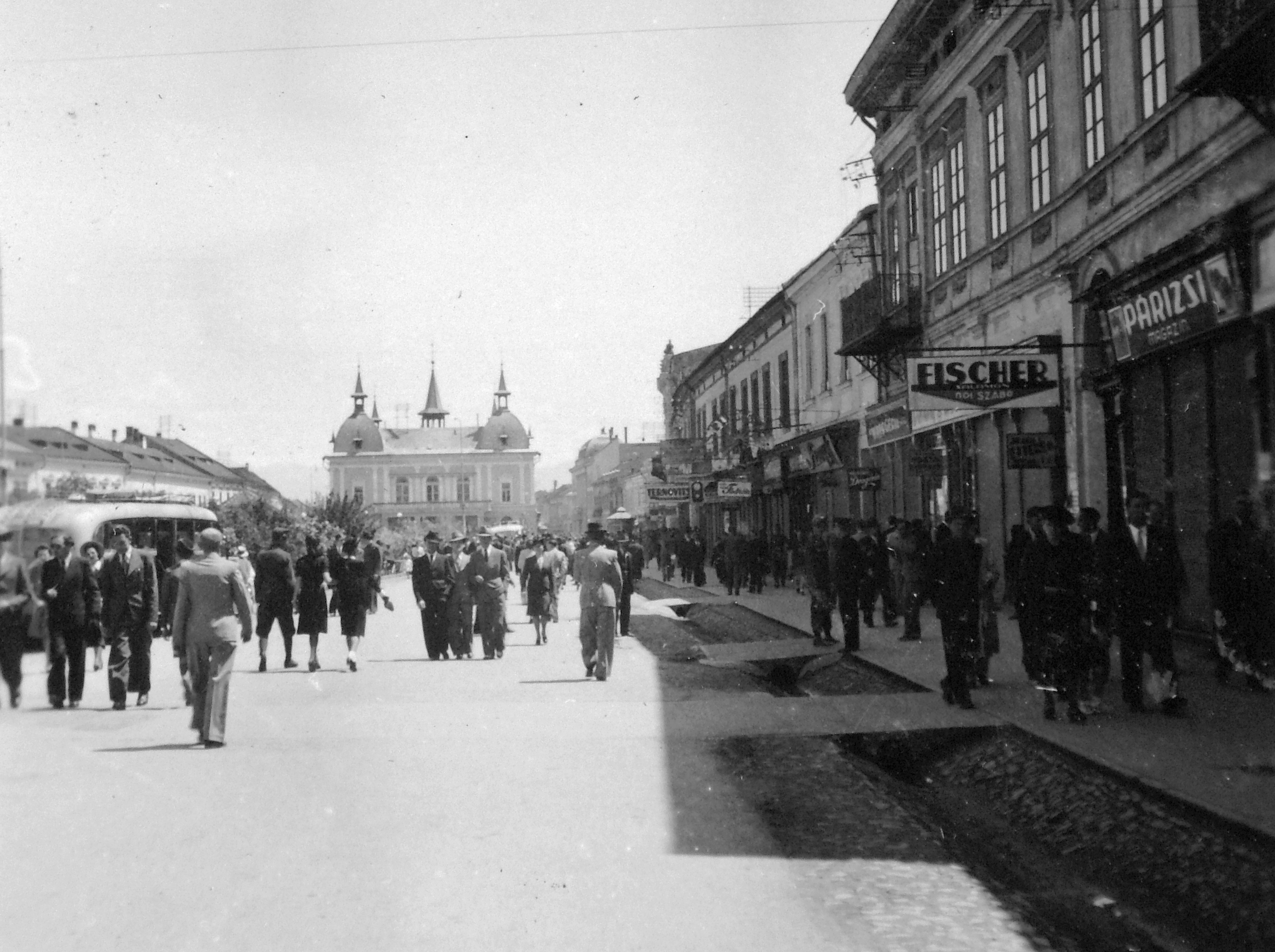 Fő tér (ekkor Horthy Miklós tér, ma Piata Libertătii), szemben a Vigadó. Location: Transylvania, Sighetu Marmatiei (then Hungary, now Romania) Tags: street view, store display, bus, pit Title: Fő tér (ekkor Horthy Miklós tér, ma Piata Libertătii), szemben a Vigadó.